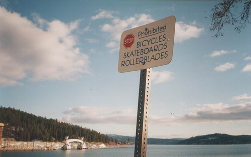 Idaho eyaletinde kaykay kaymanın yasak olduğunu gösteren bir levha.